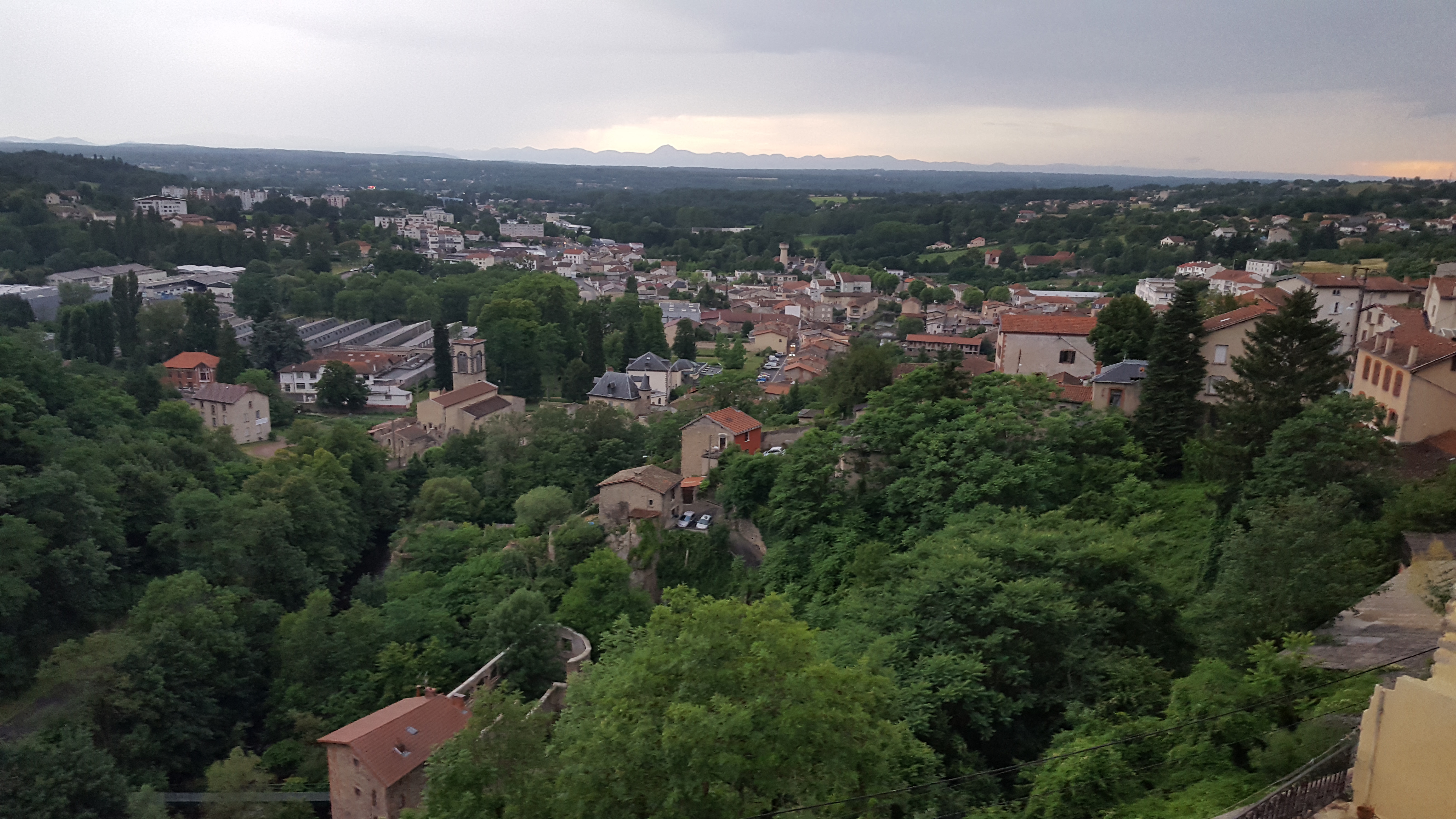 Ville basse vue de la ville haute de Thiers